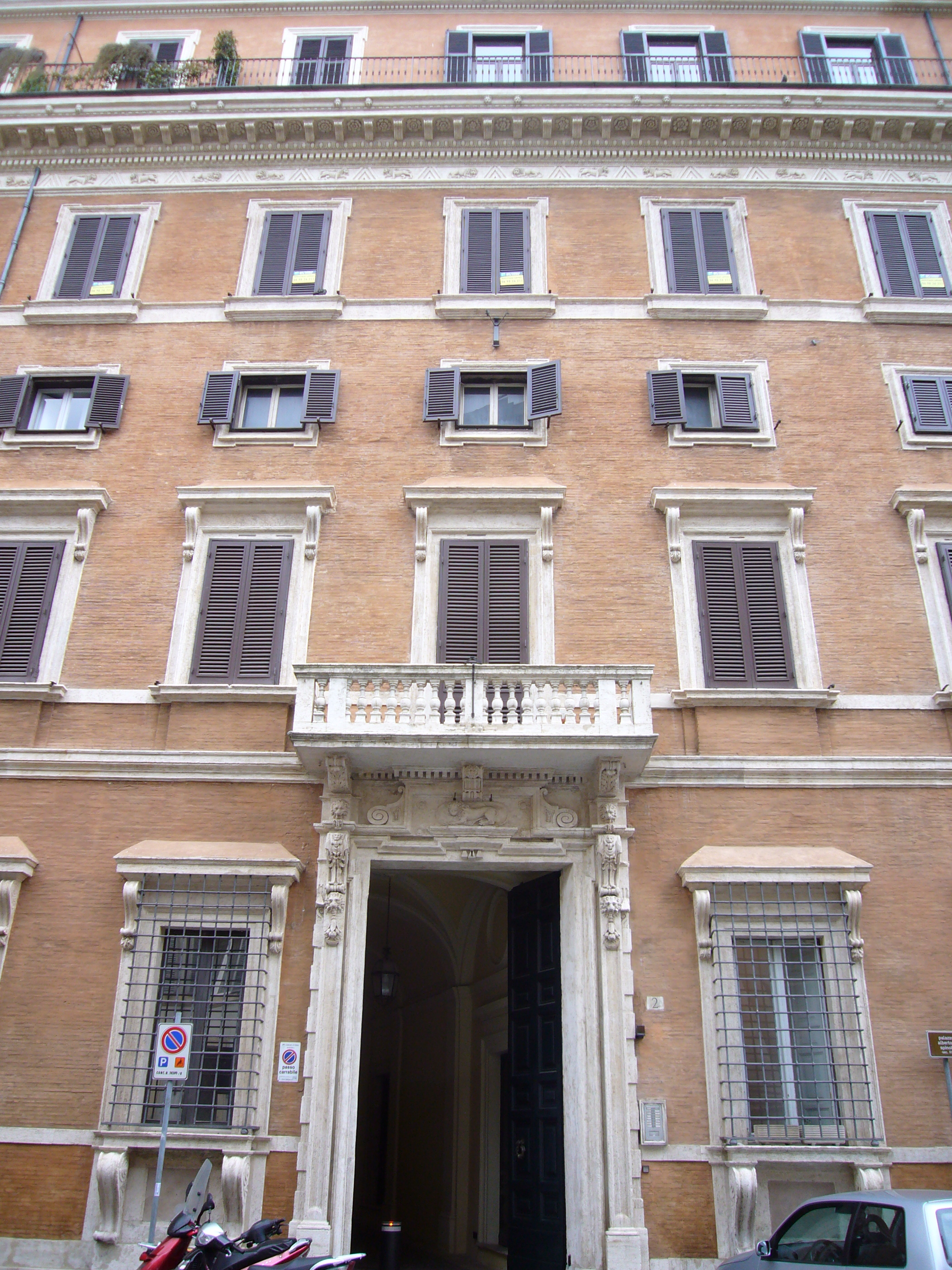 Roma, piazza Campitelli. Palazzo Albertoni Spinola.